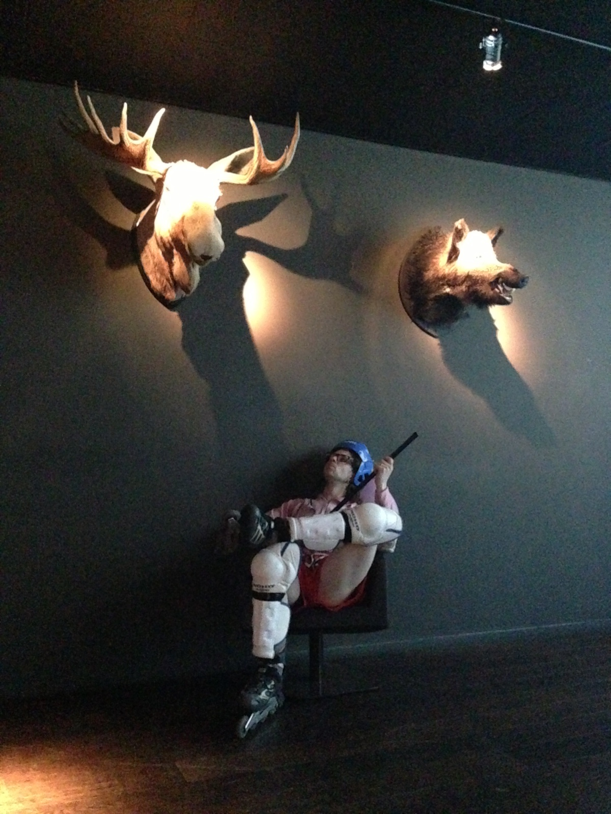 Målkungen